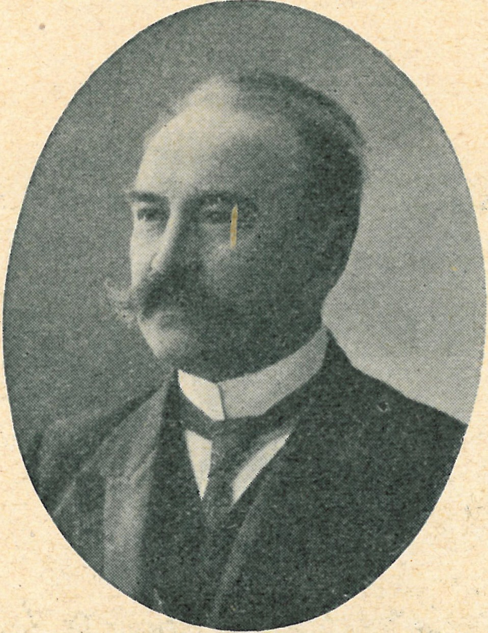 Józef Ptaś (1864-1942)